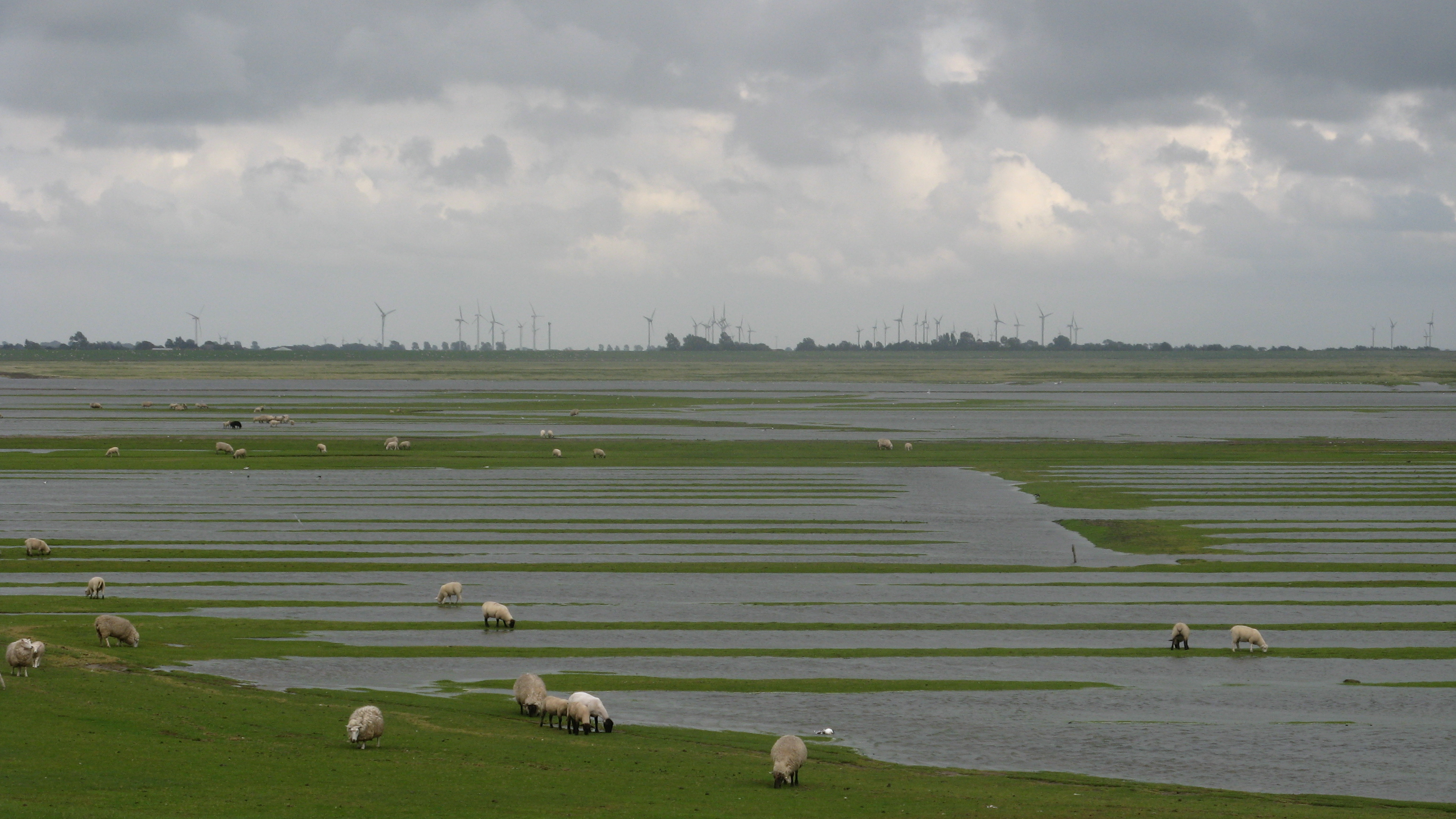 Salzwiesen bei Flut close to Friedrichskoog harbour